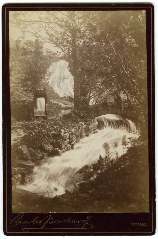 Foto kleebitud tumedale aluspapile, trükitud kuldjoon ümber foto.